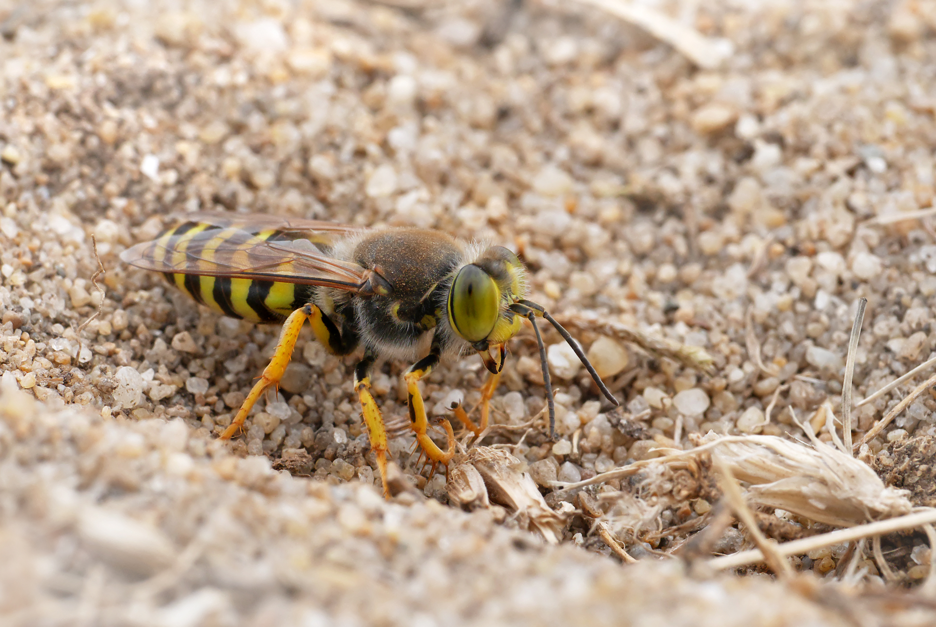 Panasonic GX7 + Leica DG Macro-Elmarit 45mm F2.8 ASPH OIS